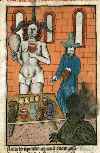 Daniel, Bel et le dragon sacré des Babyloniens. Ars moriendi. Marseille - BM - ms. 0089 (f. 063-066)